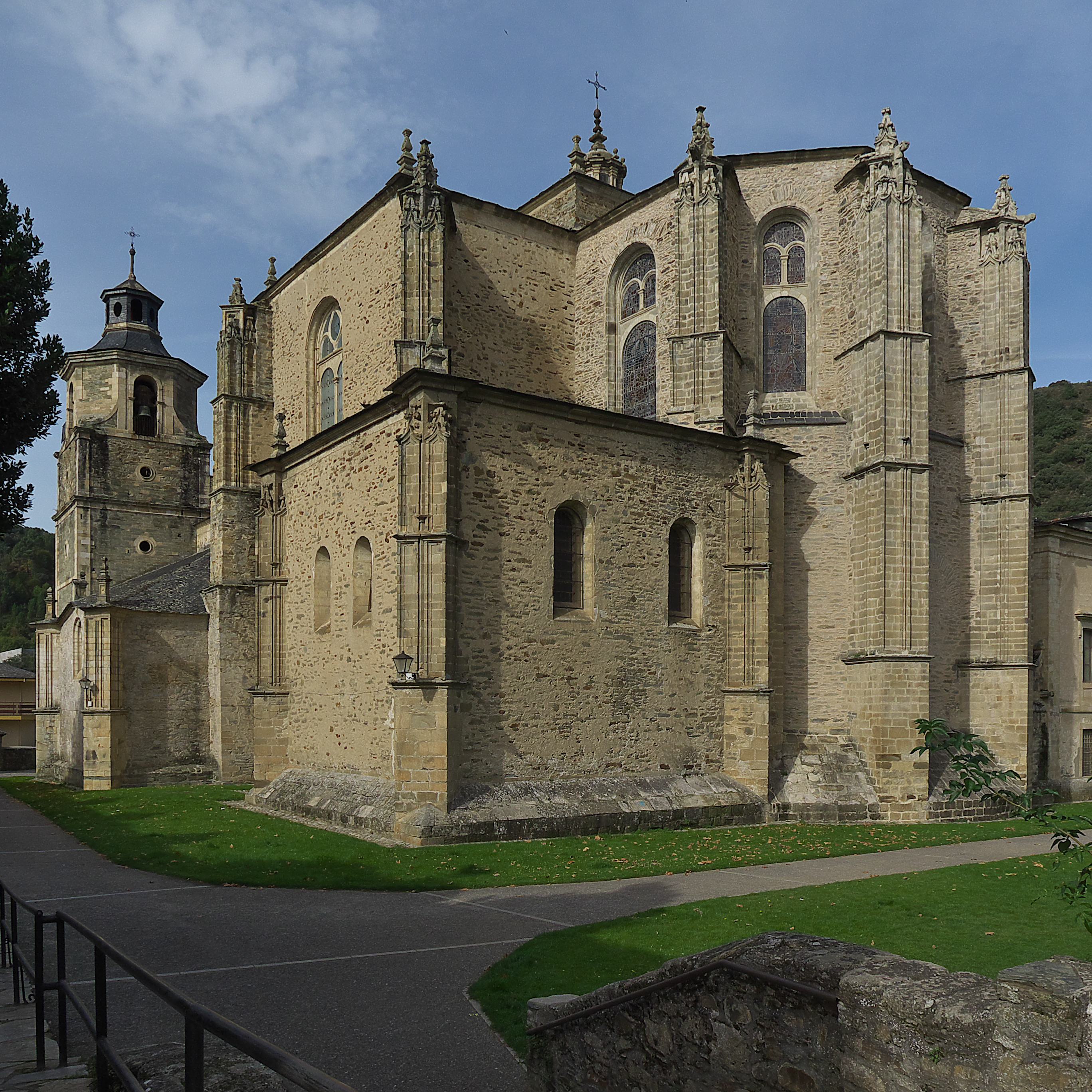 Pedro Álvarez de Toledo y Zúñiga contrata a Rodrigo Gil de Hontañón y fray Martín de Santiago, su aparejador, la reconstrucción de la futura iglesia-colegial, su panteón familiar (1533).